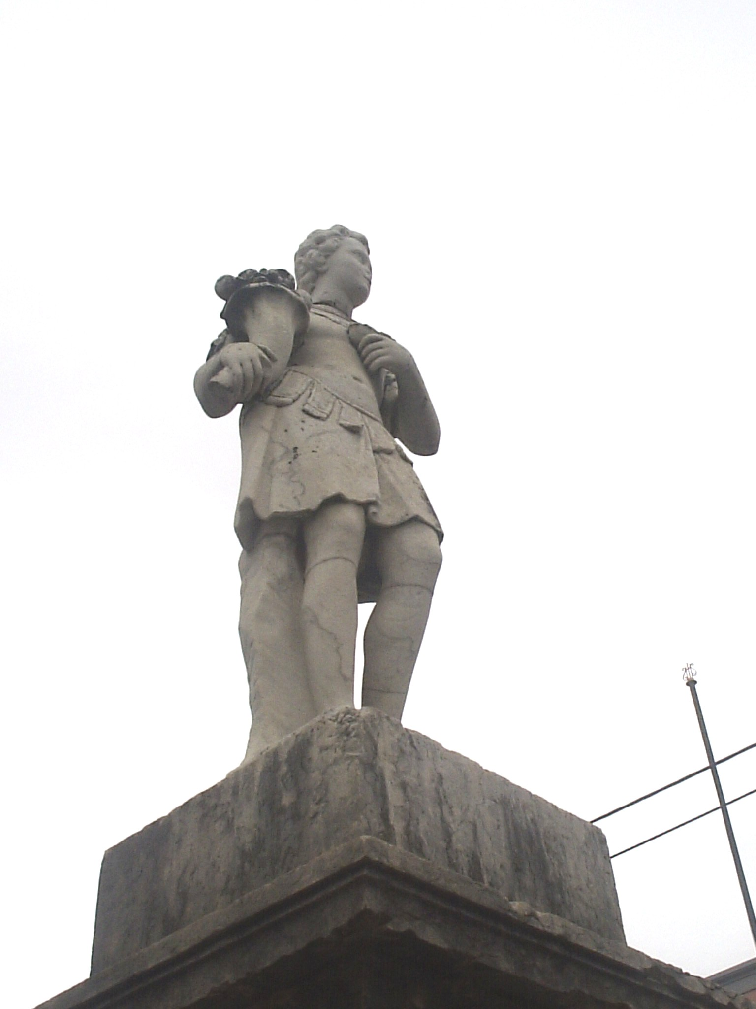 Fonte barroca, Palácio do Monteiro-Mor Categoria:Palácio do Monteiro-Mor